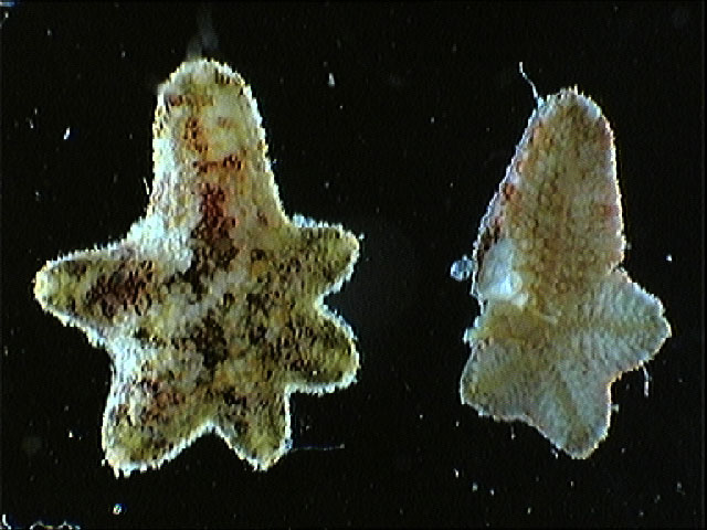 Photographies scientifiques de l'étoile de mer Aquilonastra conandae (prises à la Réunion).